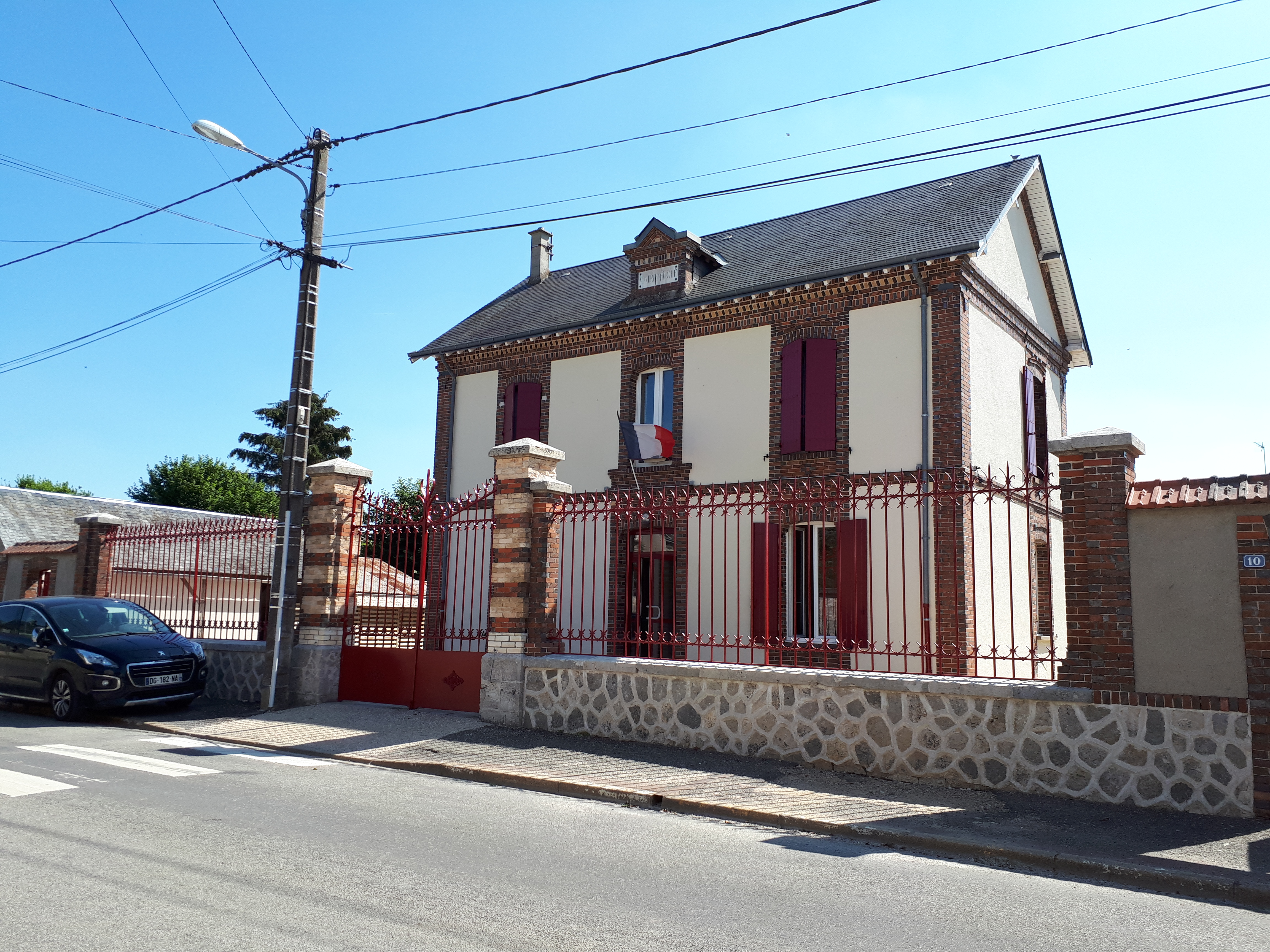 Mairie de Léthuin.